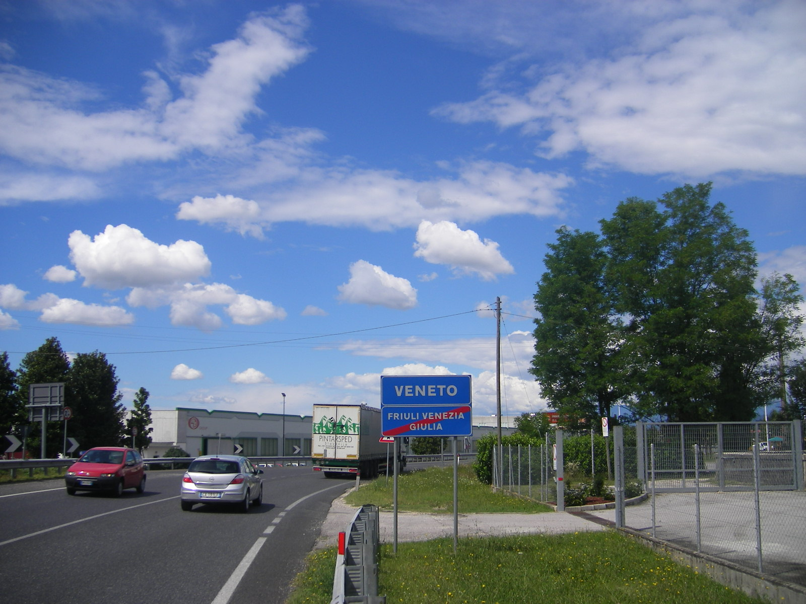 Border between Friuli-Venezia Giulia and Veneto between Sacile and Conegliano